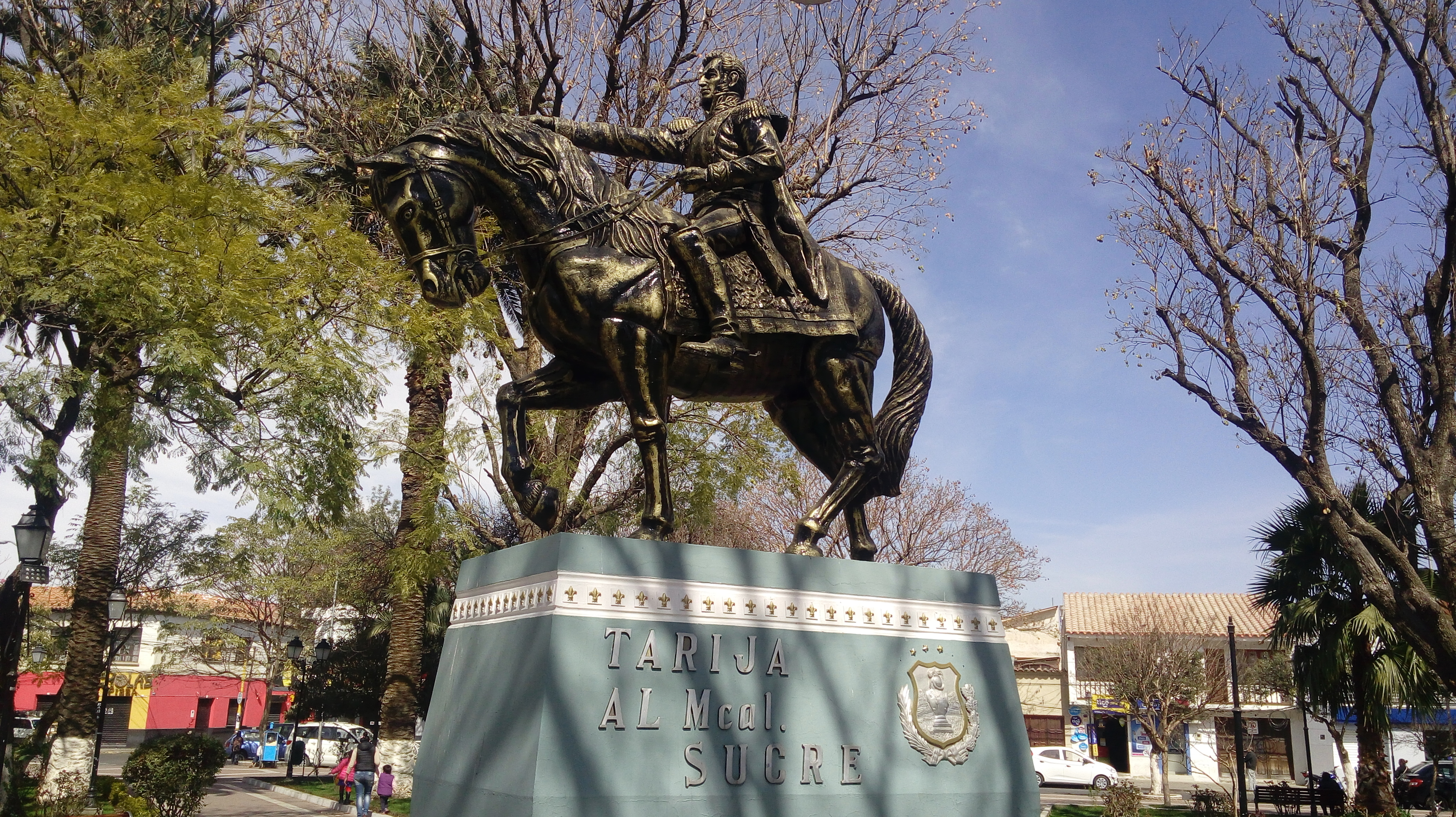 Reiterstatue im Gedenken an Antonio José de Sucre